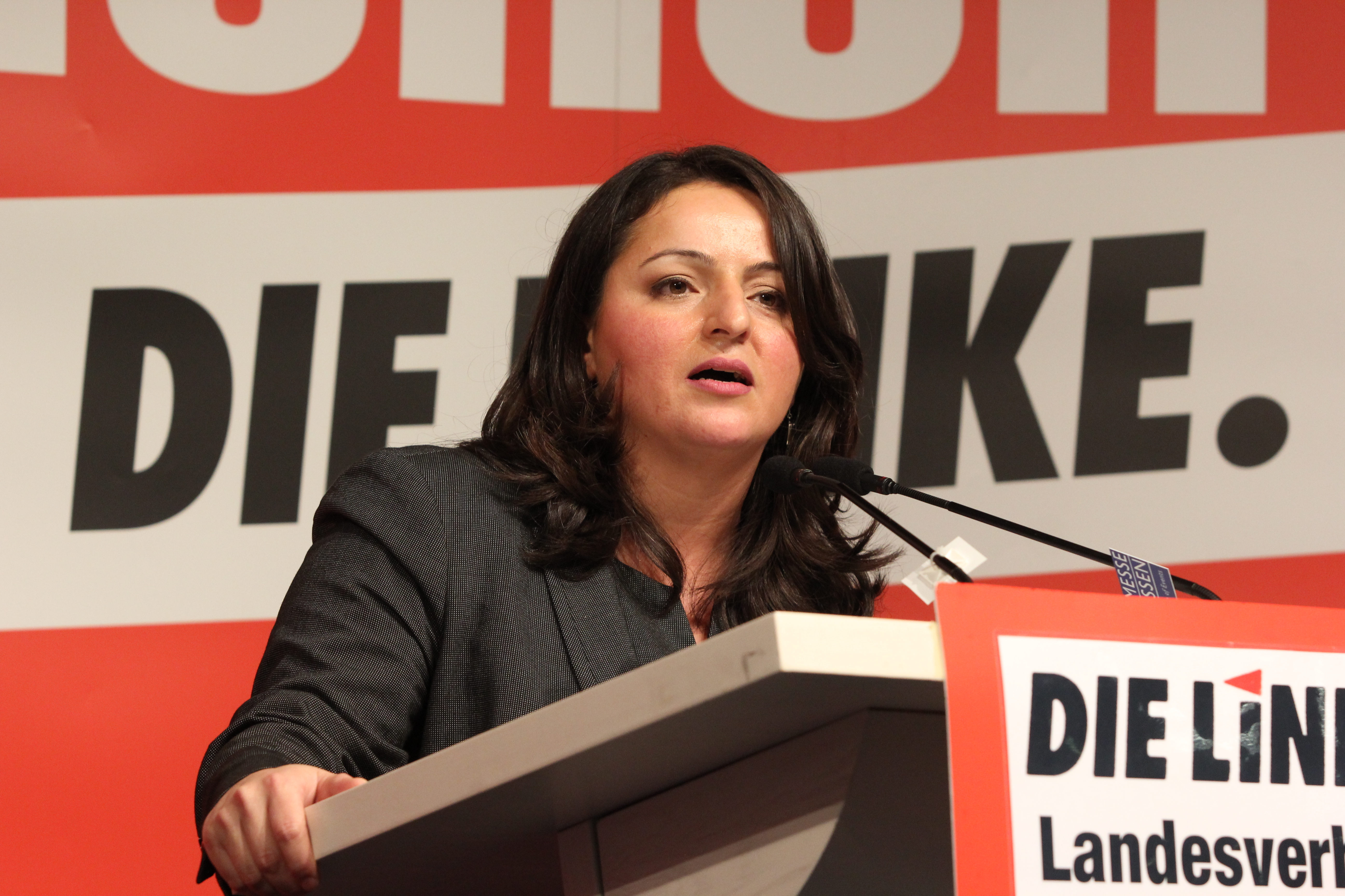 Sevim Dağdelen